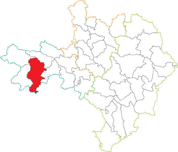 Situation du canton dans le département du Gard (France)